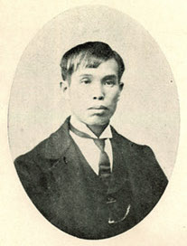 Bân-lâm-gú: 張邱玉章 Tiuⁿ Khu Gio̍k-chiong